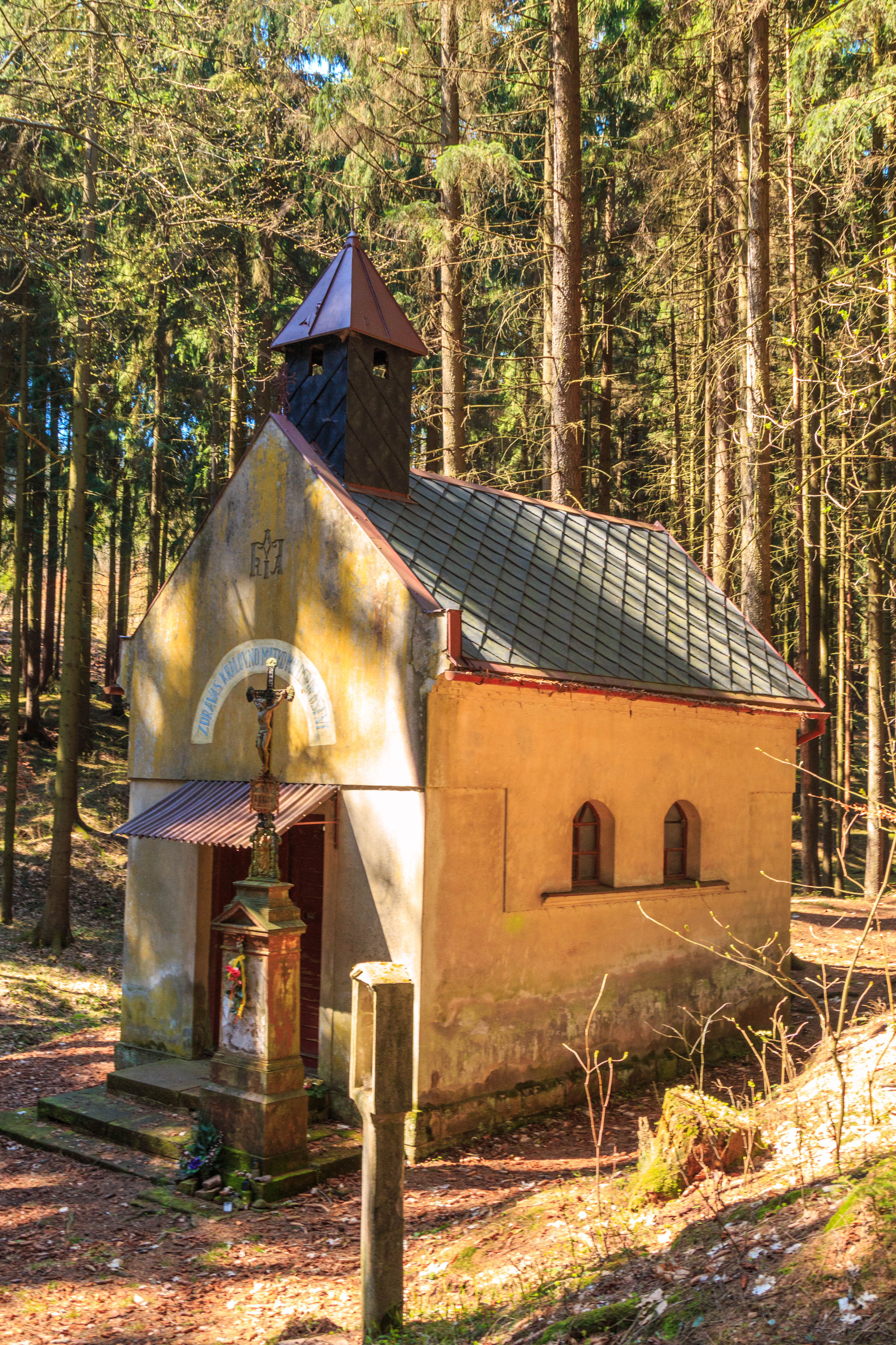 Poutní kaple Panny Marie ve Zlatnici